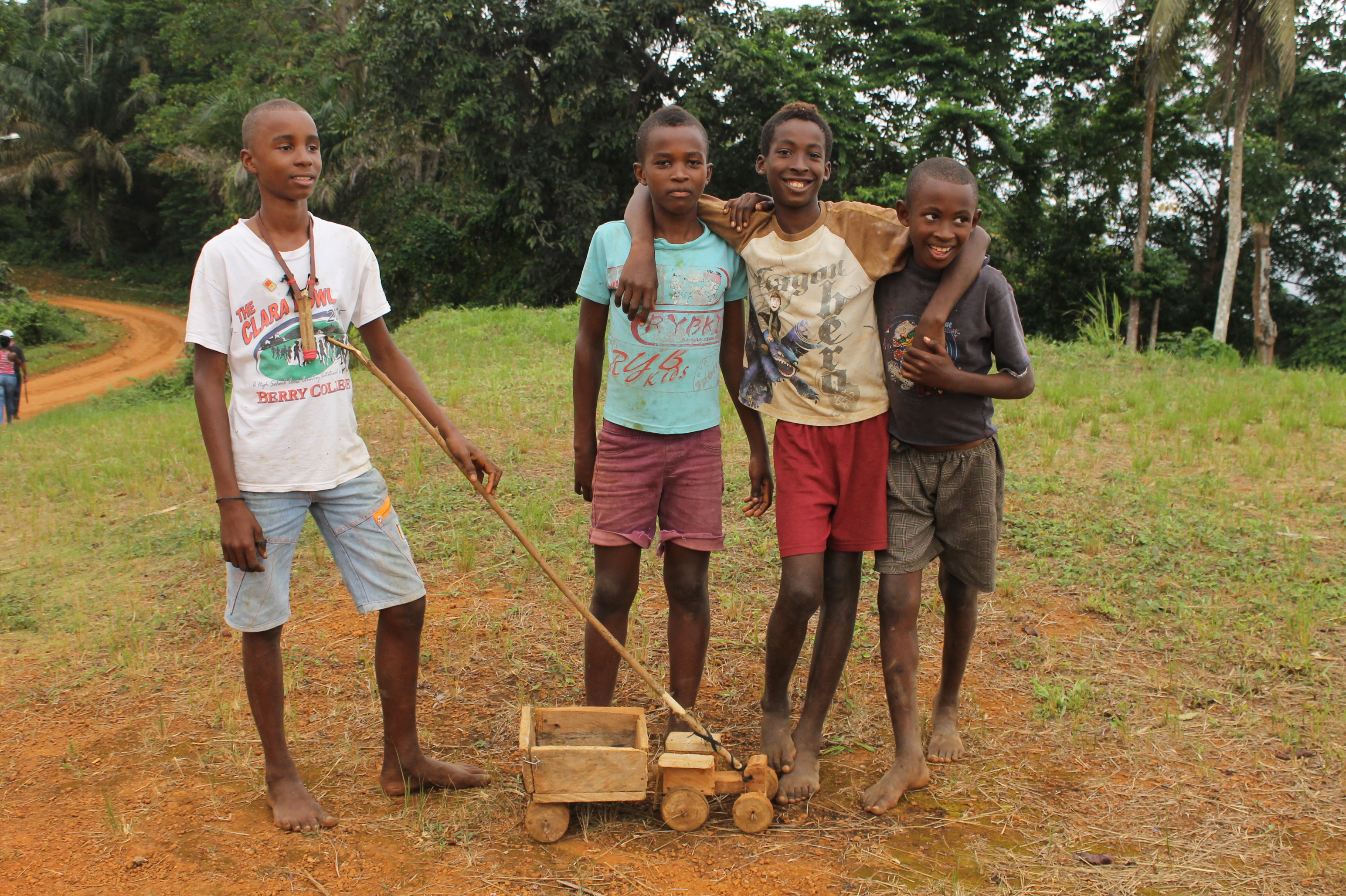 Nova Estrela This is an image of the Biosphere Reserve: Island of Príncipe Biosphere Reserve